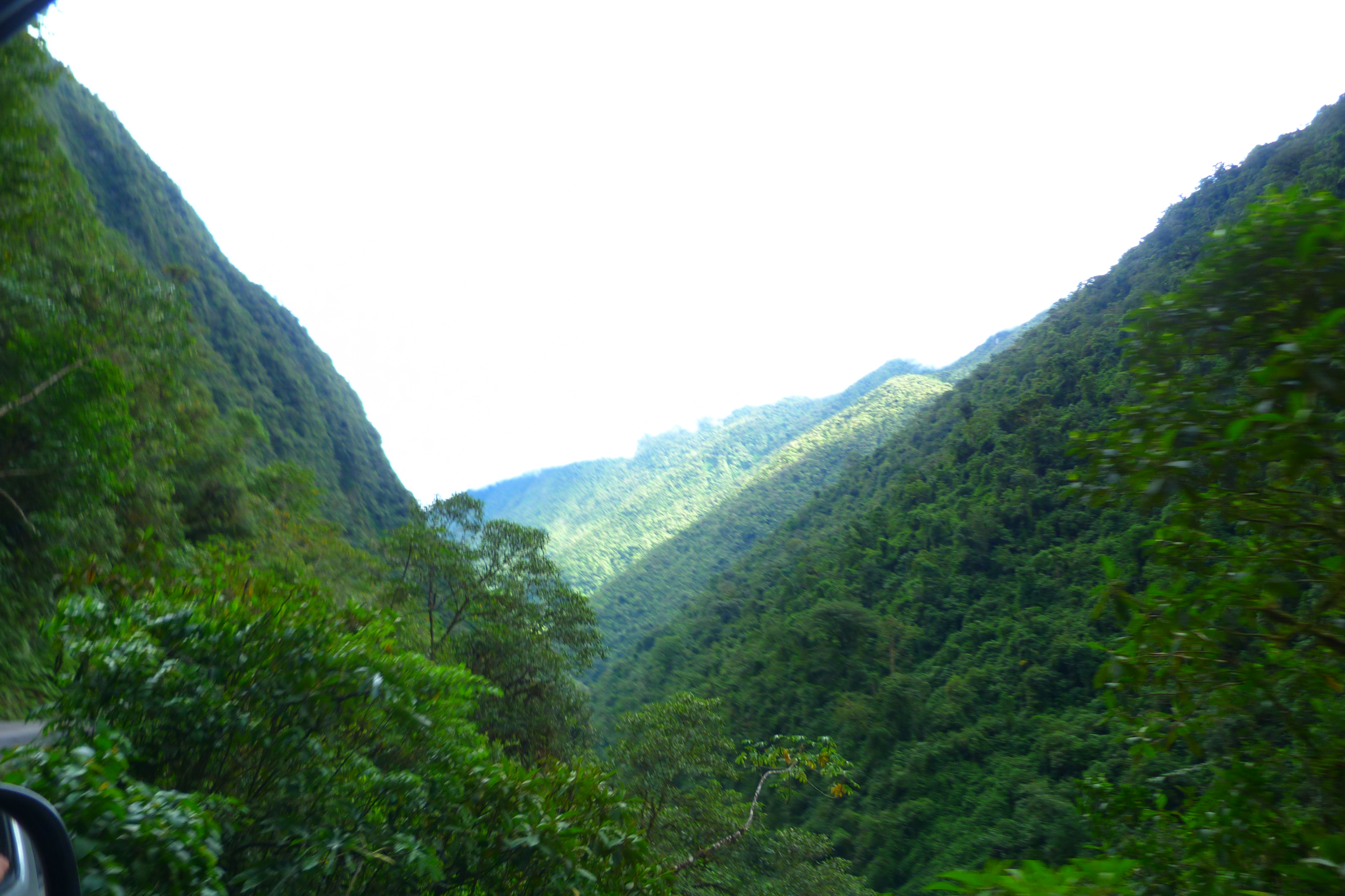 Vista del PN Yanachaga Chemillen